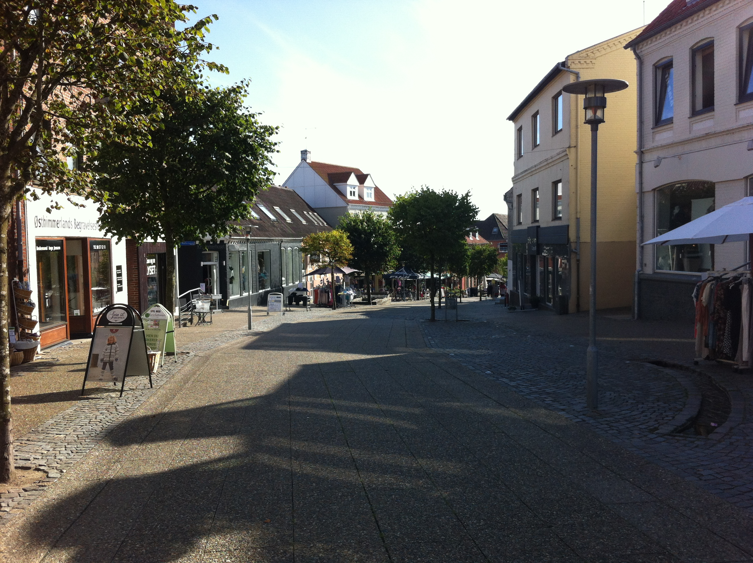 Storegade (Hadsund) set fra midten af gaden og også set mod Vestergade